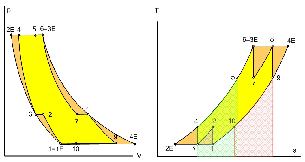 Description= p-v-Diagramm und T-s-Diagramm eines Gasturbinenprozesses mit internem Wärmeaustausch